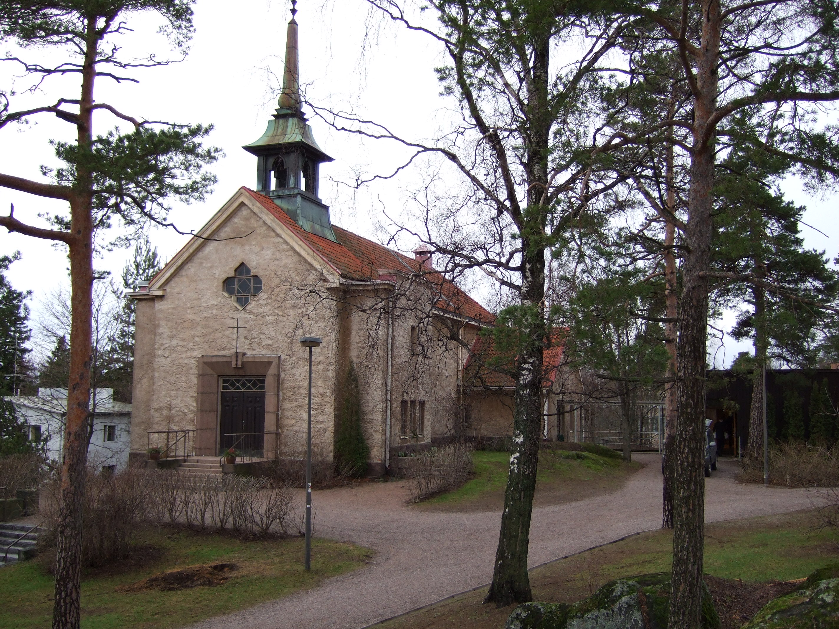 Church of Kulosaari, Helsinki